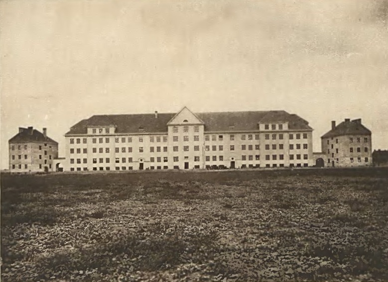 Szkoła przy ul. Grójeckiej 93 w Warszawie